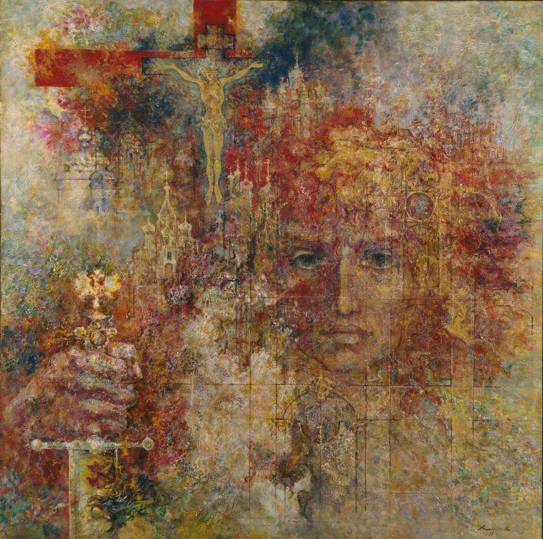 Явление императору Константину креста с указанием на победу является одним из самых сильных знамений, изменившим не только ход истории Римской империи, но и форму устроения христианского мира.